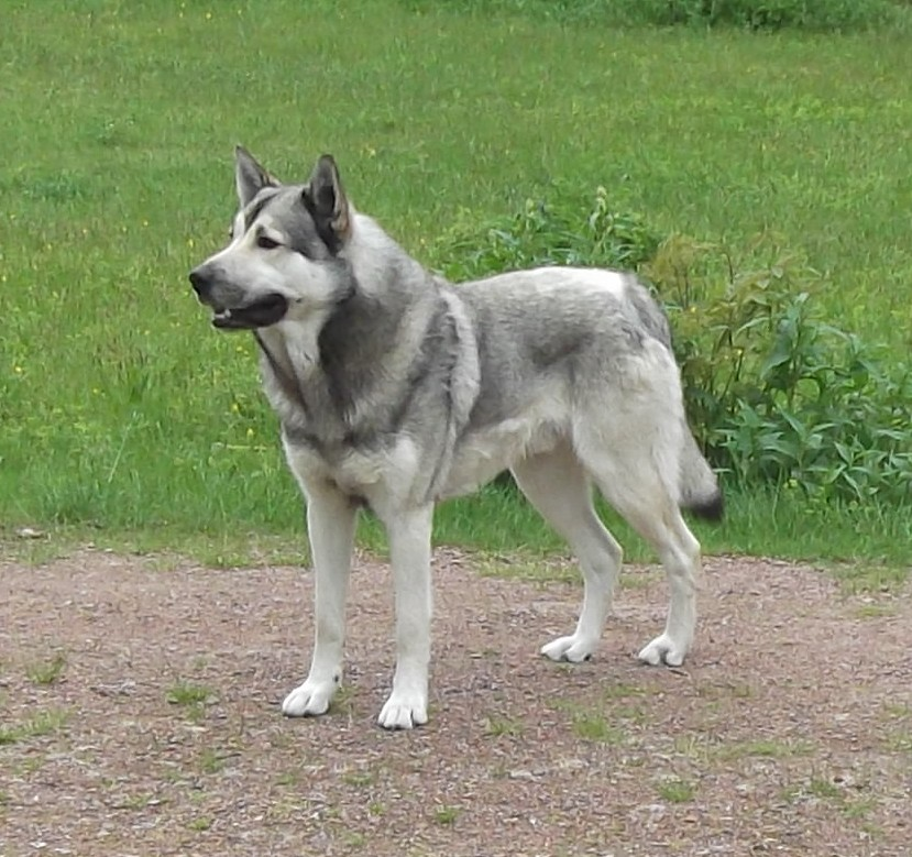 Hedehund